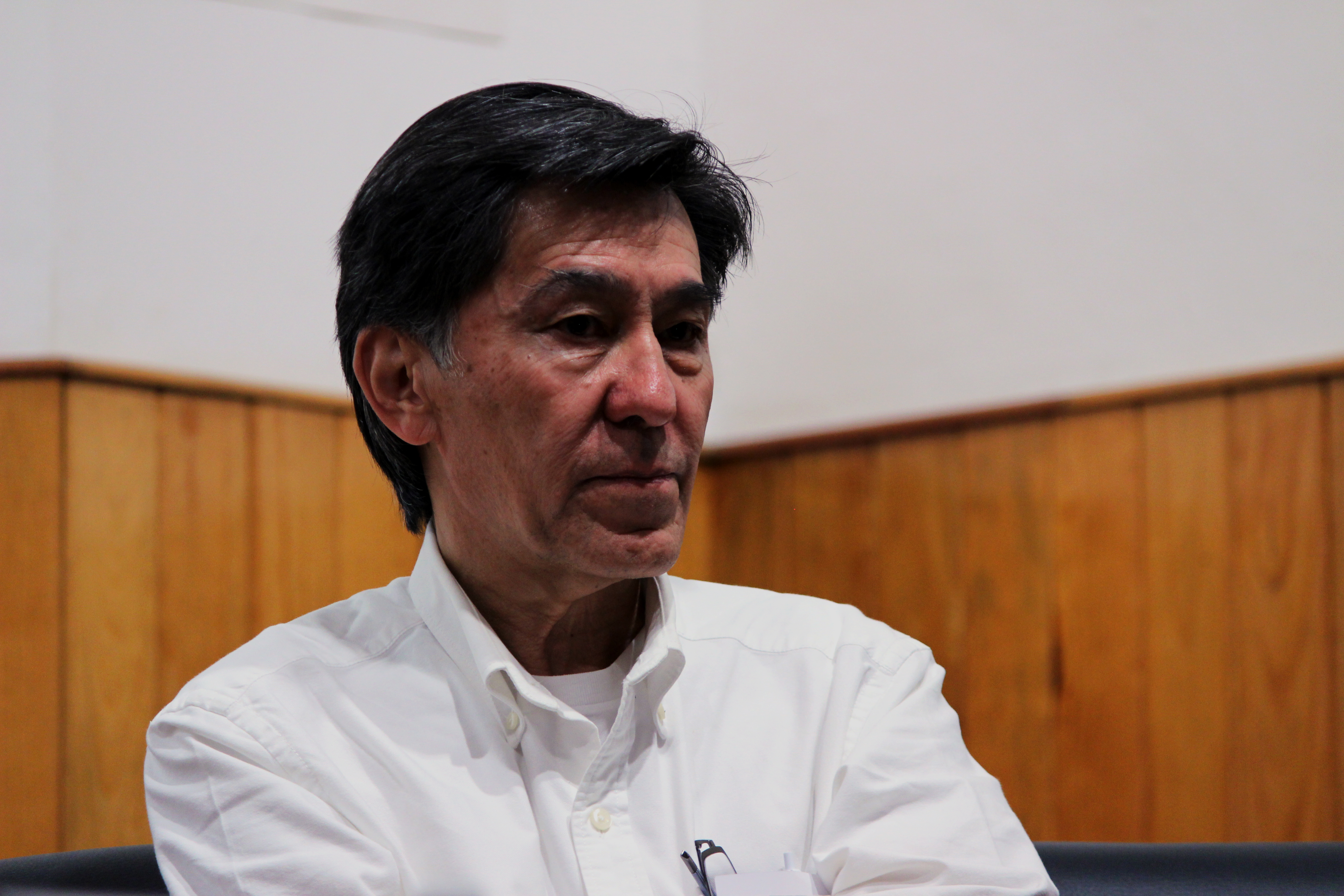 Dr. Jaime Urrutia Fucugauchi en la presentación del libro Ver nacer en volcán, en el Centro cultural Clavijero; fotografía de Sarahi Alfaro Guzmán.